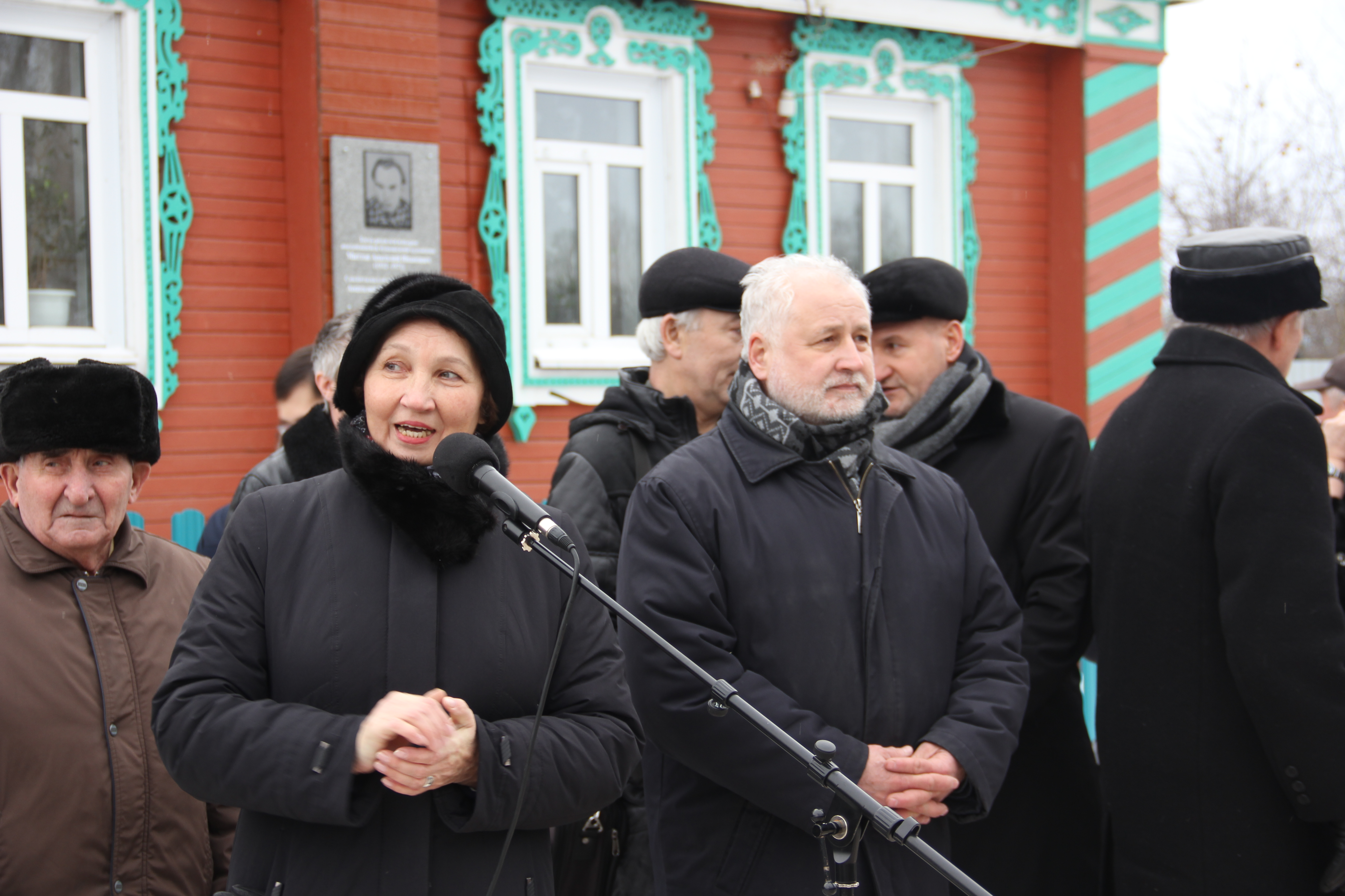 Торжественное открытие памятной доски, посвященной художнику, состоялось в его родном селе Тобурданово Канашского района Чувашской Республики, при участии местных жителей, школьников, представителей республиканской, районной общественности, известных деятелей культуры. На фотографии (слева направо): брат художника В.И. Миттов, кандидат искусствоведения А.И. Мордвинова и автор памятной доски - скульптор, заслуженный художник России, народный художник Чувашии и В.П. Нагорнов.